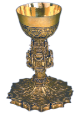 Asteasuko kaliza